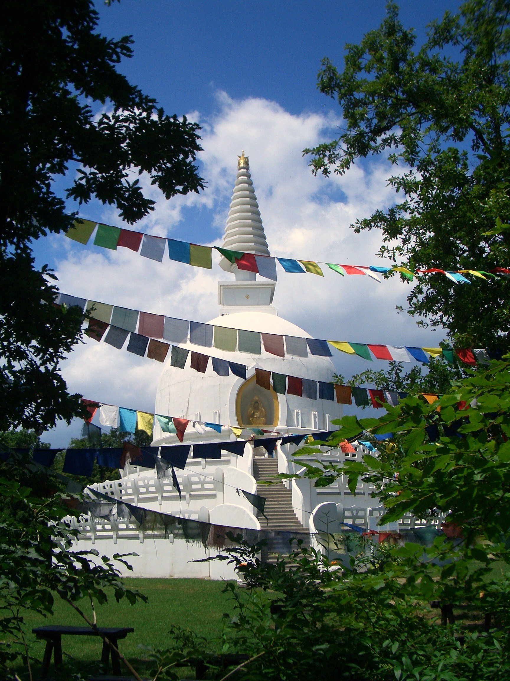 A zalaszántói sztupa